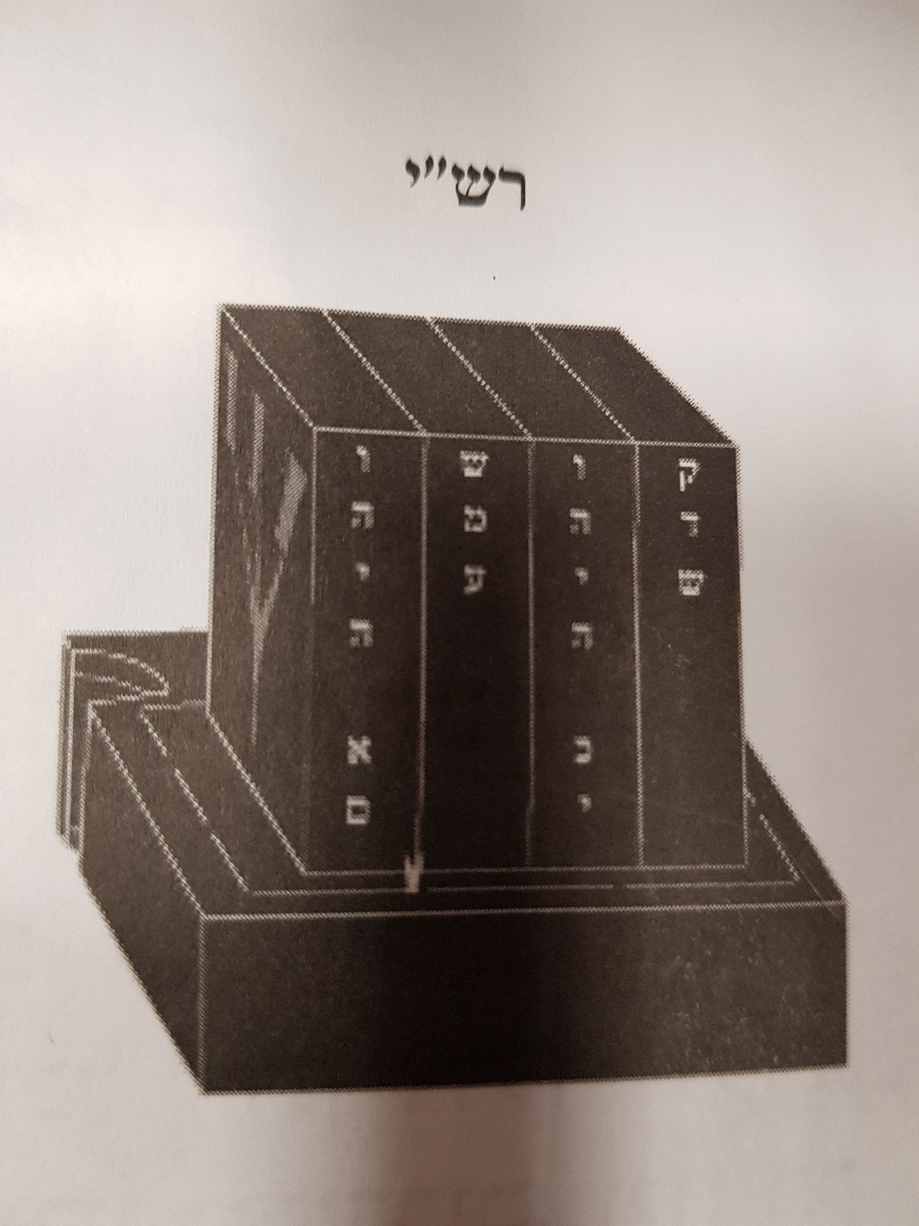 איור תפילין של ראש לפי שיטת רש"י